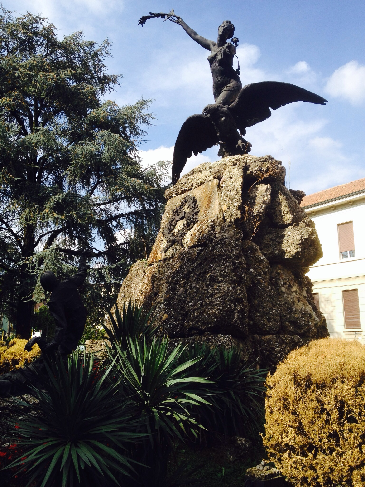 Monumento ai Caduti This is a photo of a monument which is part of cultural heritage of Italy.